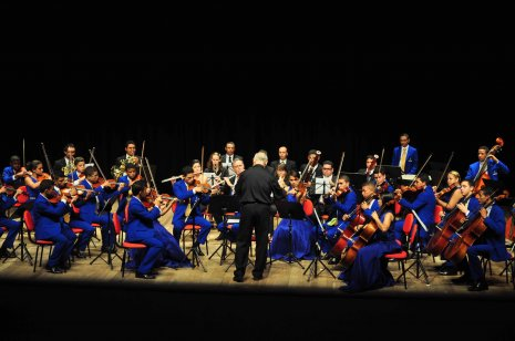 Orquestra Cidadã se apresenta no Teatro Luiz Mendonça, no Recife.